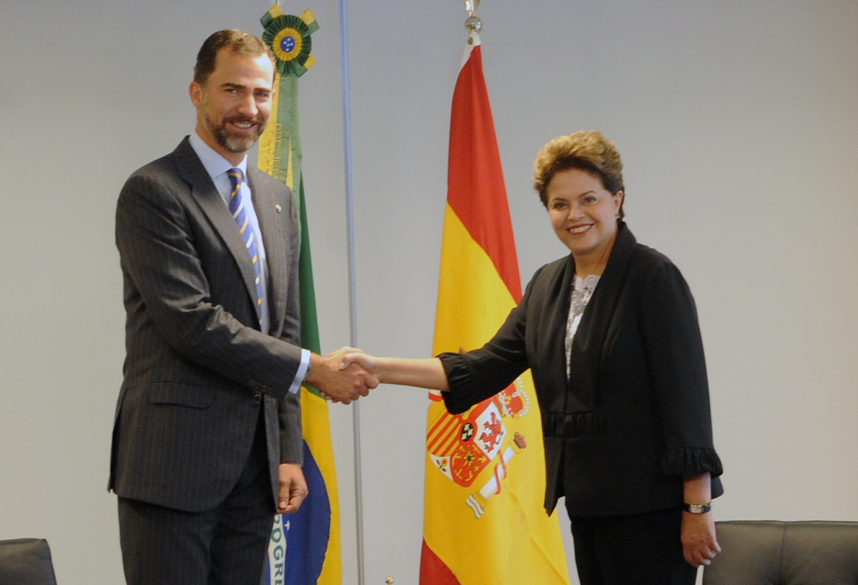 A presidenta Dilma Rousseff recebe o príncipe Felipe de Astúrias no Palácio do Planalto. Brasília, 2 de janeiro de 2011.